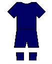 Tottenham-mez